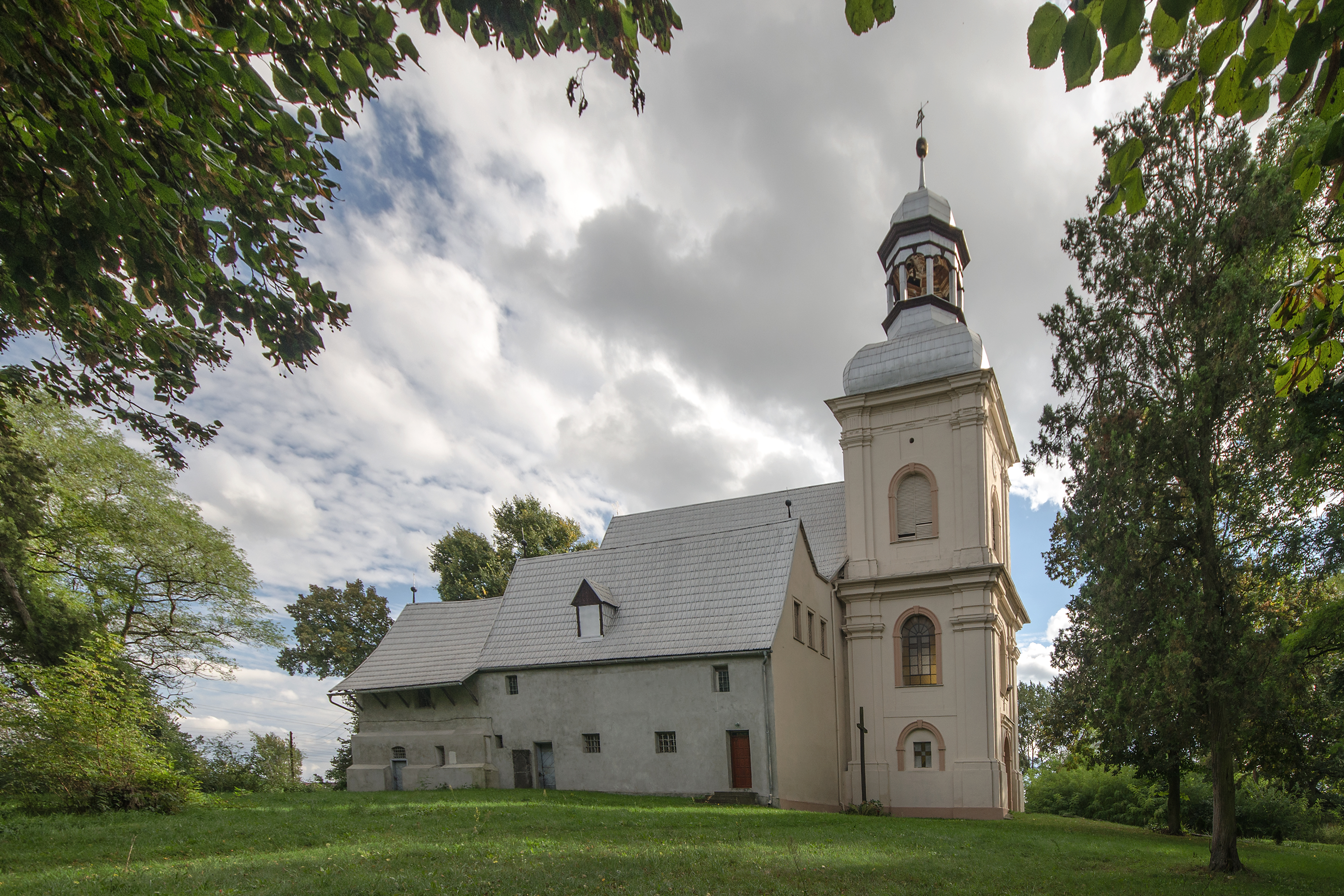 Masłów - dawny kościół ewangelicki, obecnie rzymskokatolicki filialny p.w. Najświętszej Maryi Panny Nieustającej Pomocy, 1592, 1710